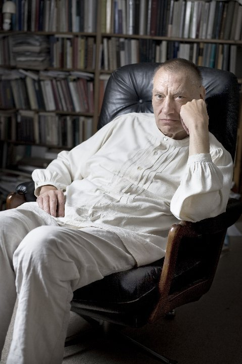 Bild von Manfred Lauermann